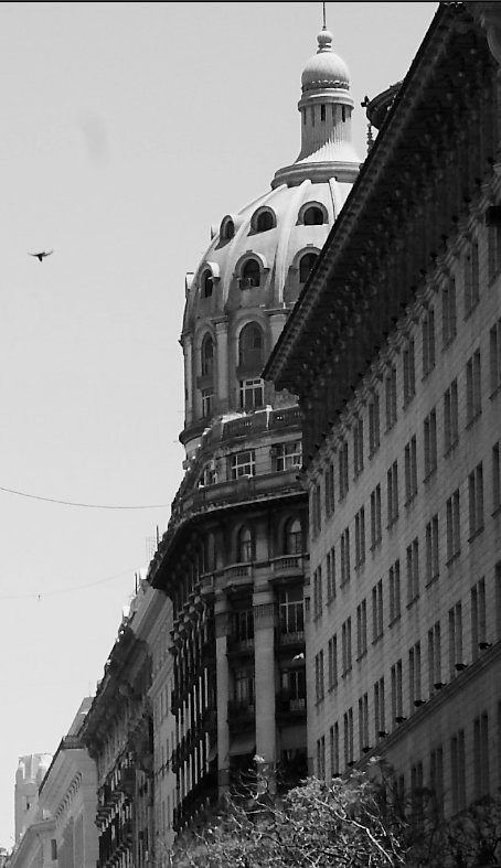 Buenos Aires. Diagonal Norte. Cúpula del Edificio Bencich Hnos detrás del Banco de Boston. Fragmento de la foto referida en "source"